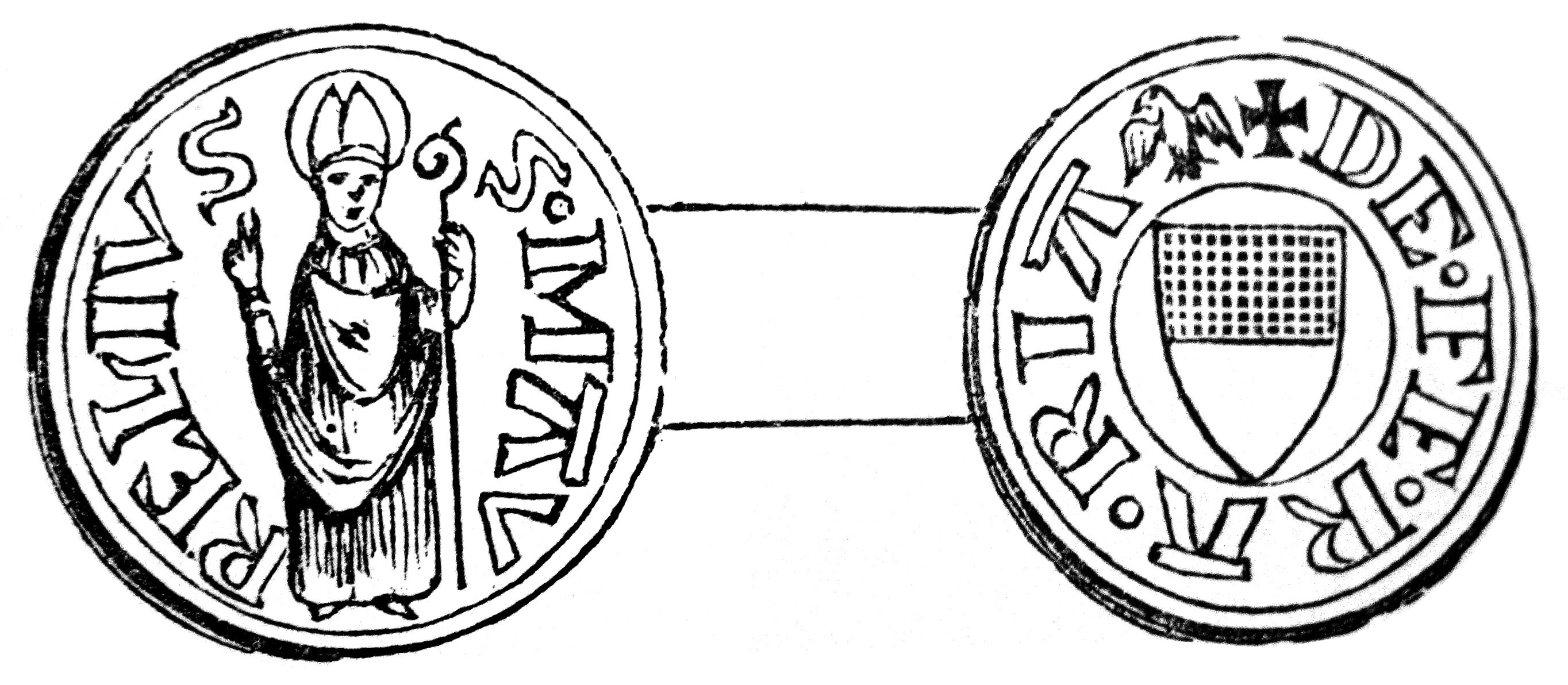 Quattrino ferrarese del 1381 che porta per la prima volta lo stemma del comune.